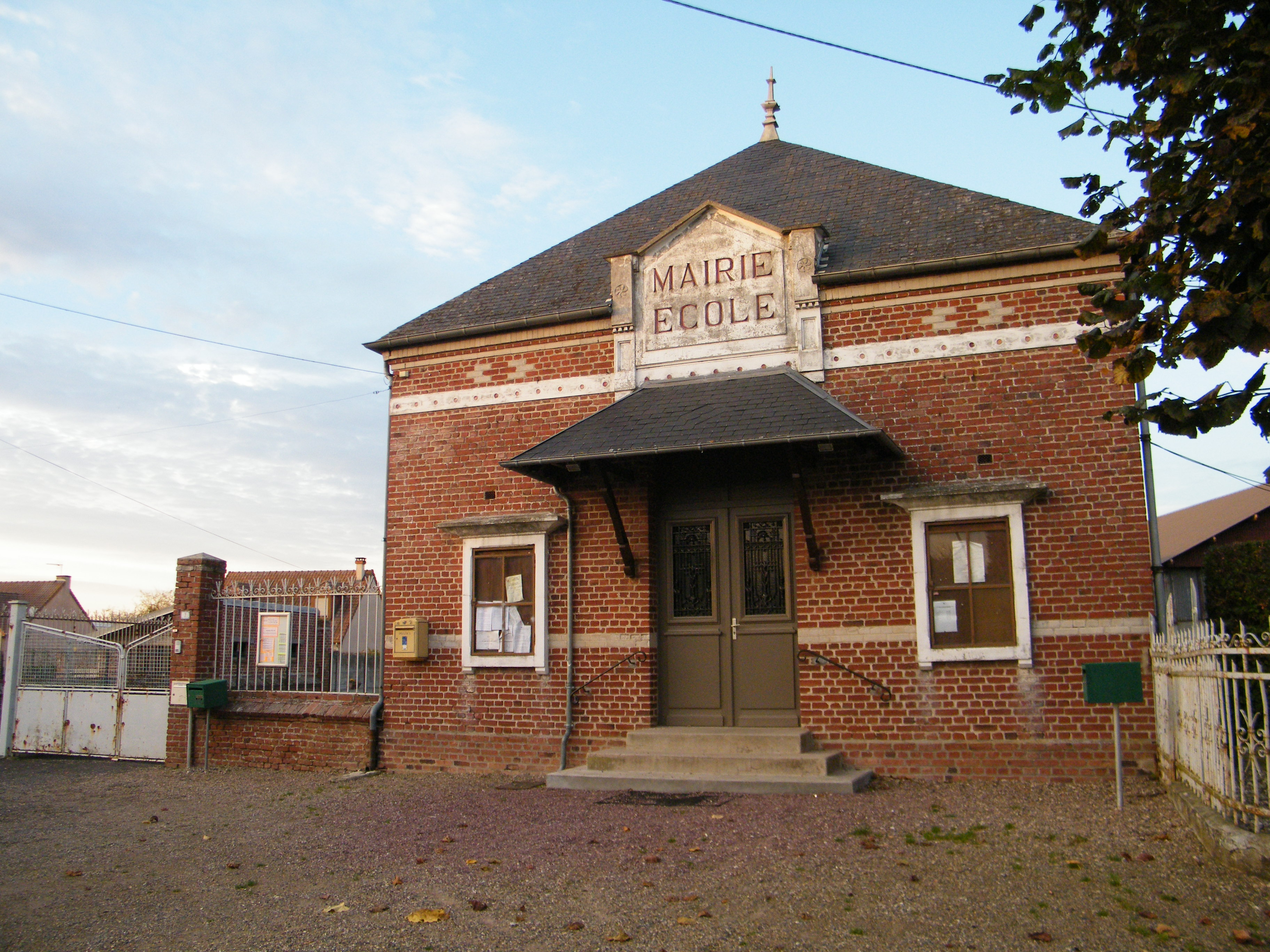 Mairie.